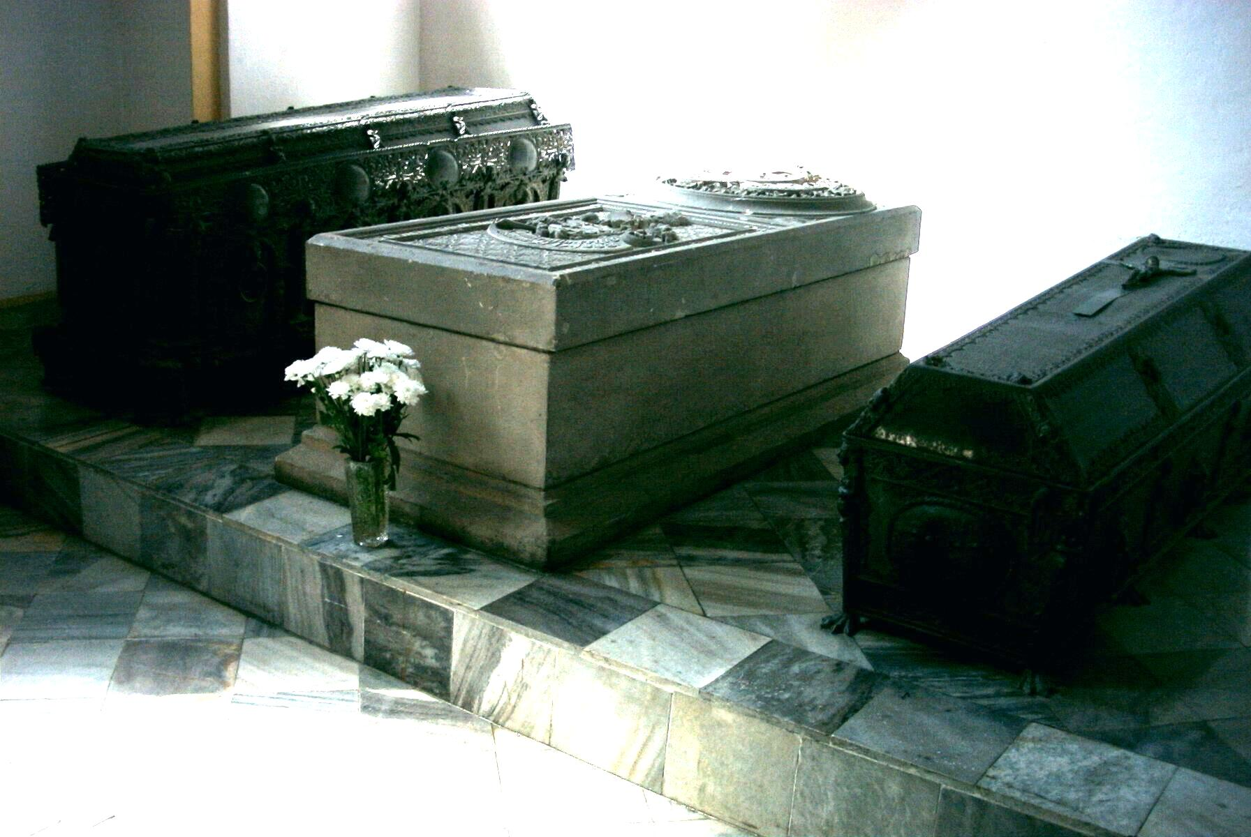 Gruftkapelle Pommernherzöge Rügenwalde